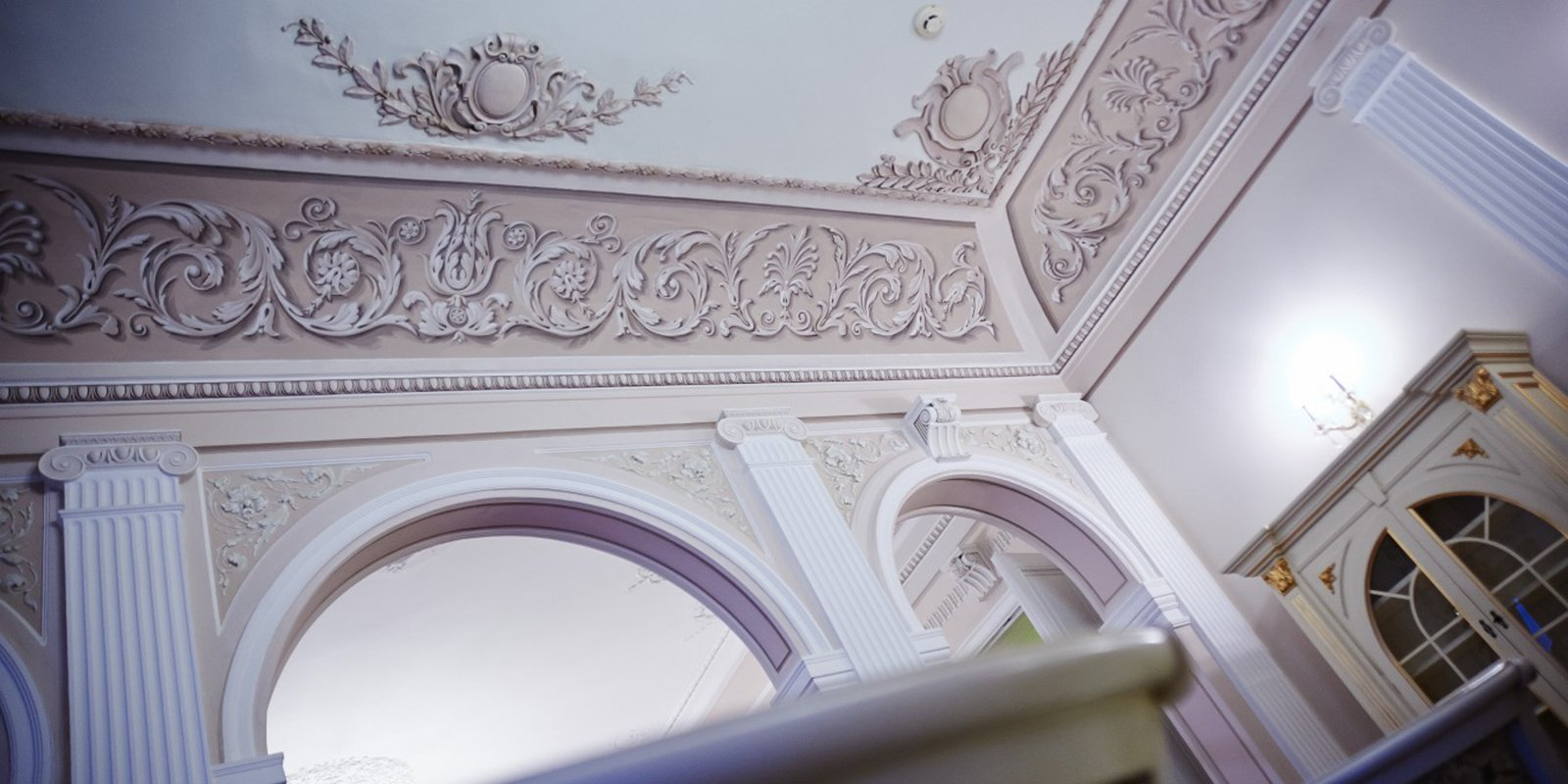 Роспись потолка и лепнина в интерьере московской городской усадьбы Прохоровых-Хлудовых в Подсосенском переулке, 30. XVIII-XIX вв.